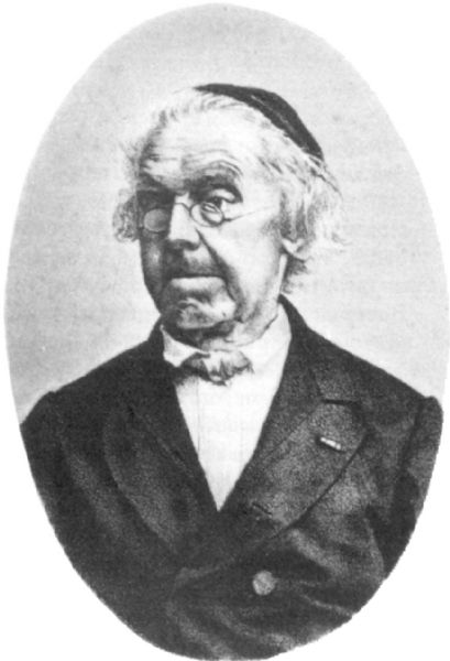 Hendrik Jan Nassau (1791-1873)